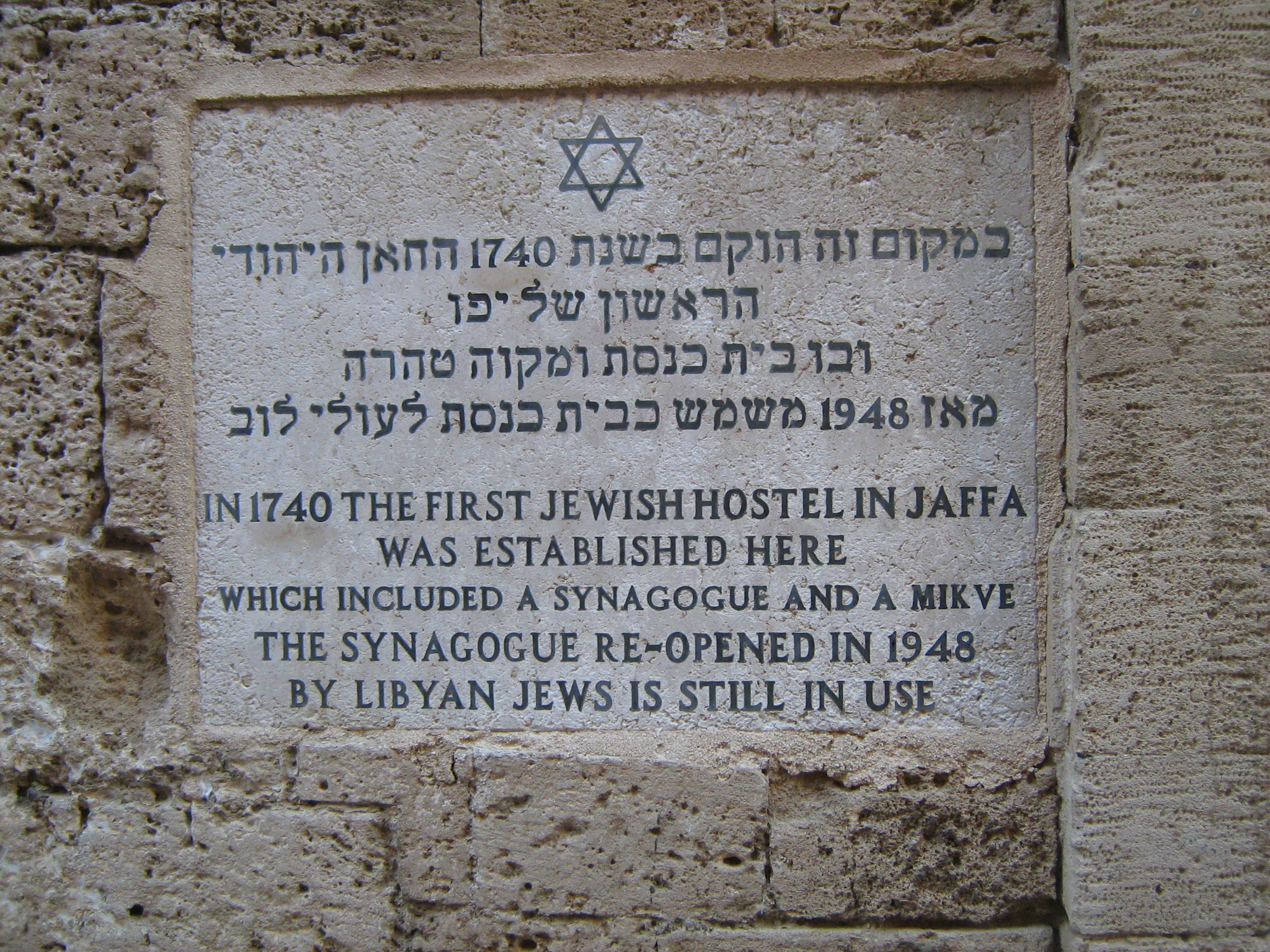 בית הכנסת של עולי לוב בסמטת הדגים ביפו העתיקה